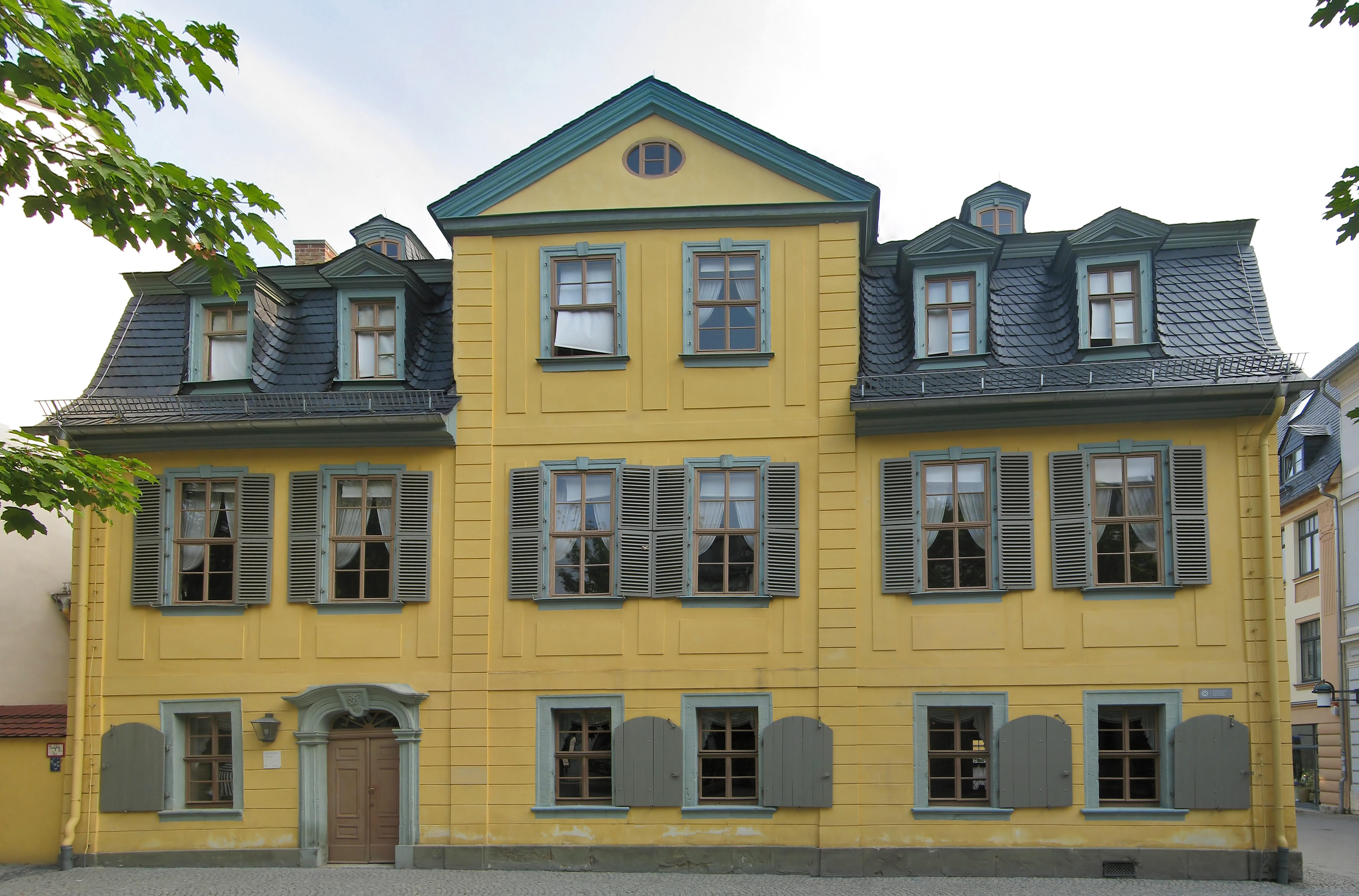 Schillers house in Weimar